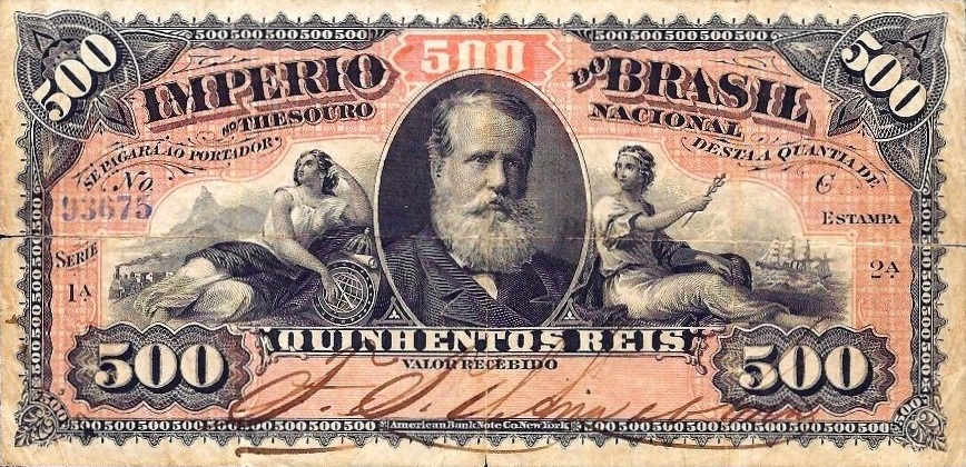 Cédula de 500 réis, emitida pela Casa da Moeda no Período Imperial. Acervo do Museu Paulista.